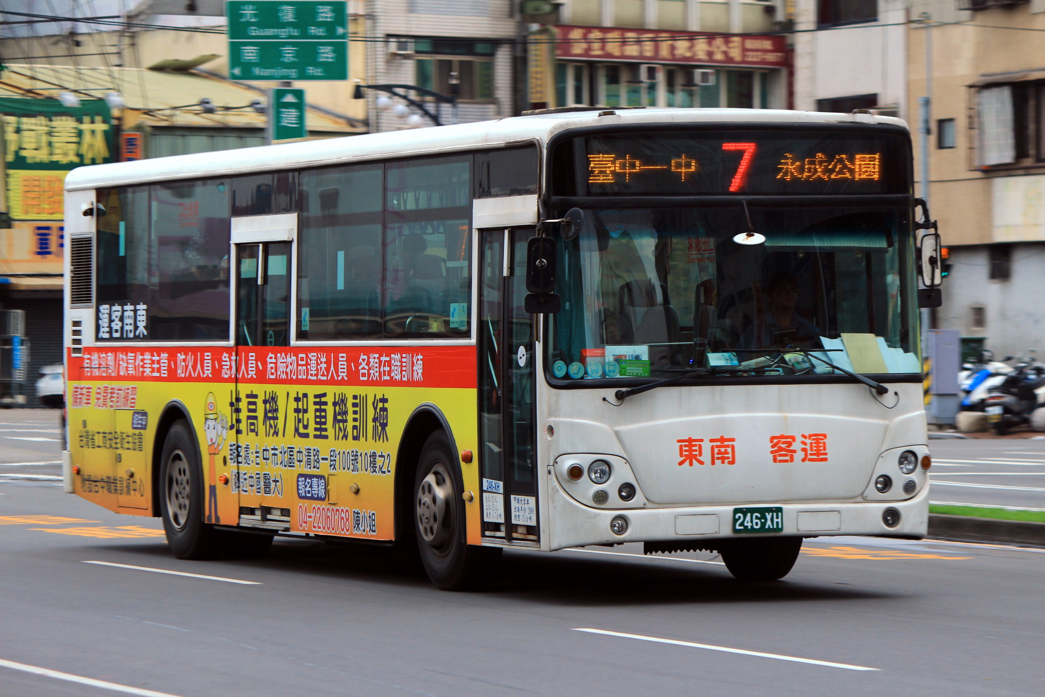 中文（台灣）: 東南客運大宇BC211M大客車246-XH